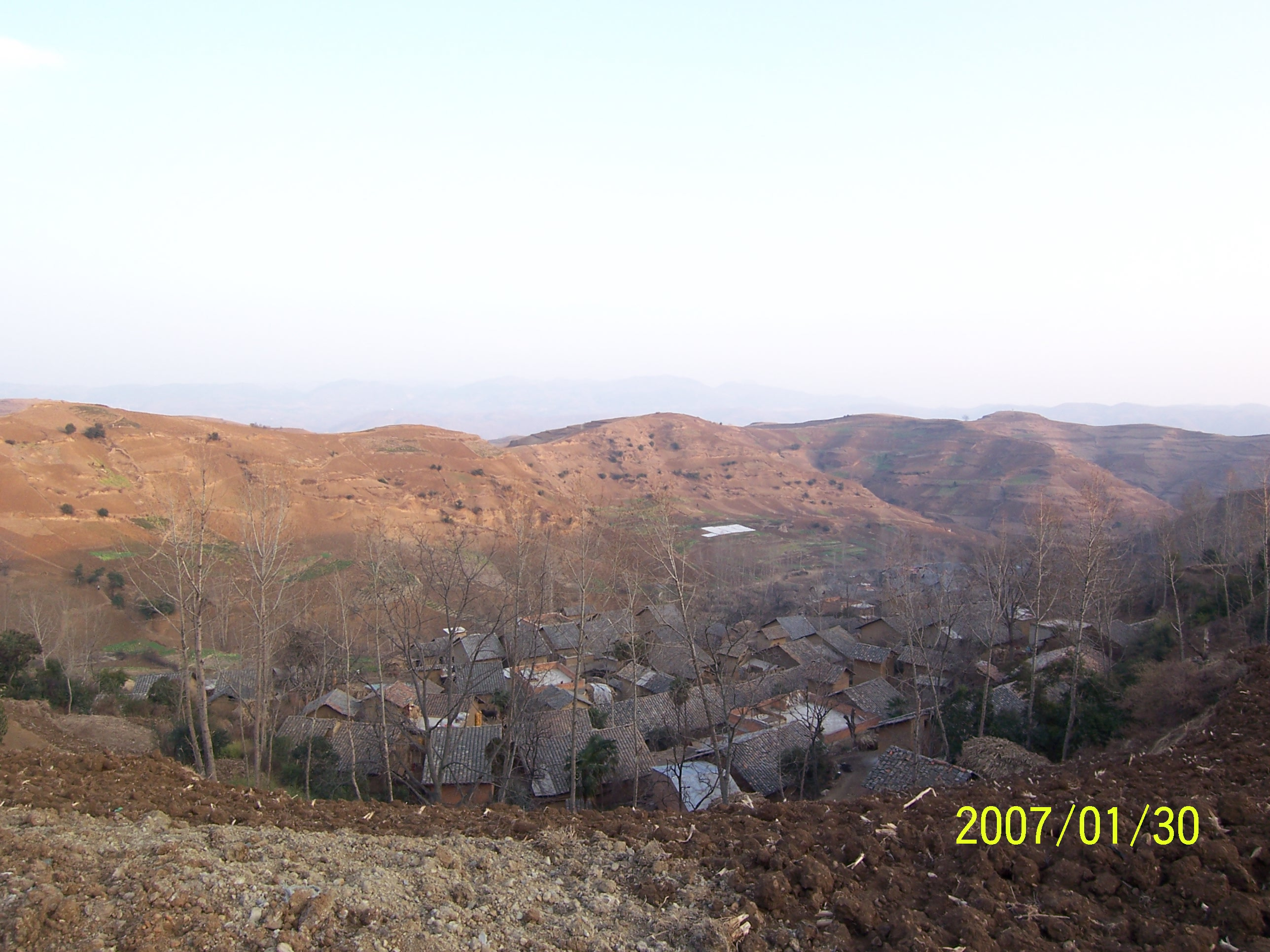 守望乡卡子村